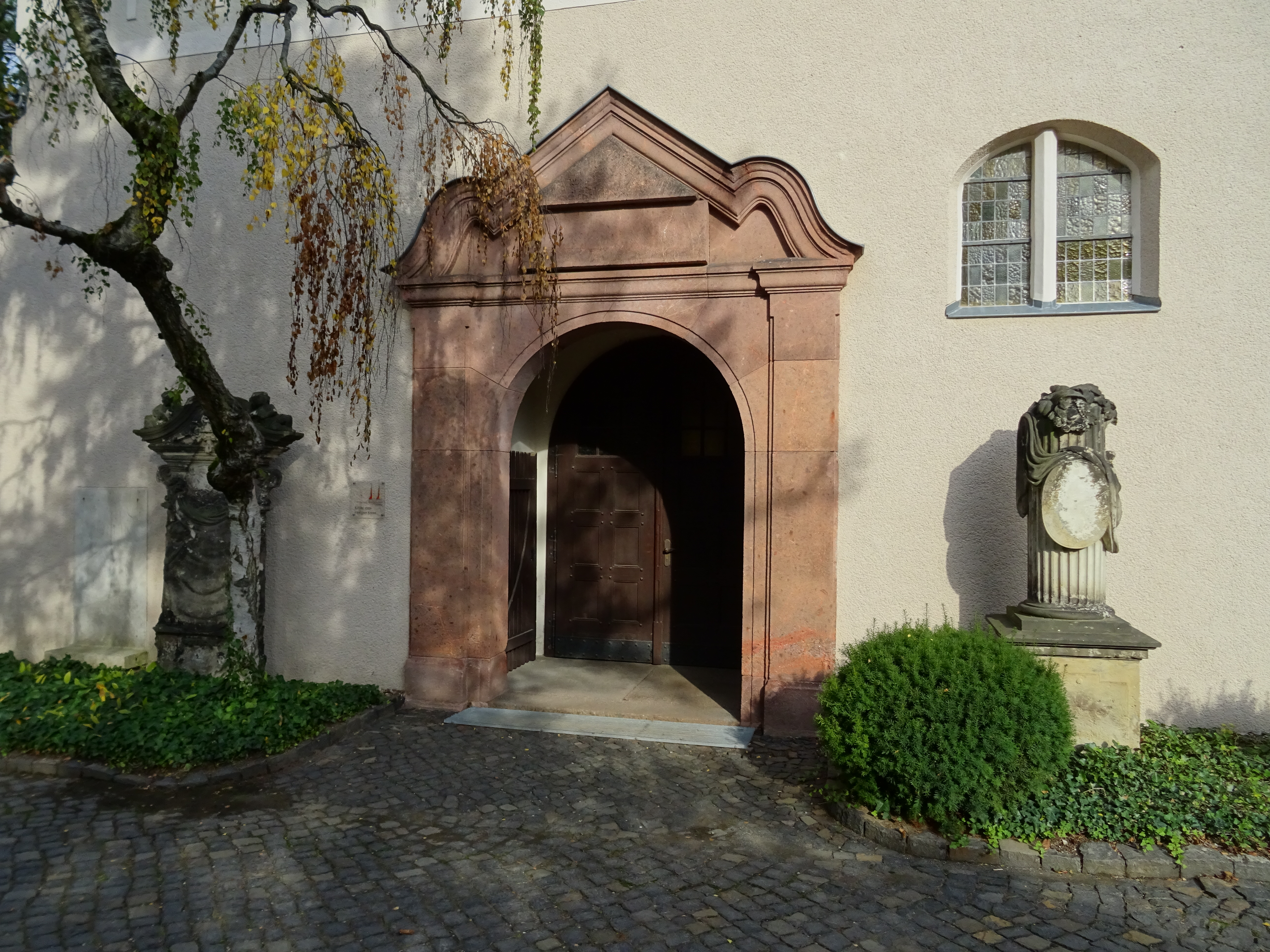 Friedhofskirche Heilig Kreuz in Grimma. Von 1556 bis 1559 erbaut. 1607 umgebaut und 1910 erneut umgebaut und erhöht. Mit historischen spätgotischen Flügelaltar (entstanden um 1519) stammt aus der 1888 abgerissenen Grimmaer Nicolaikirche. Er enthält reich ausgestattete Schnitzwerke und Bilder aus der Cranachschen Schule.